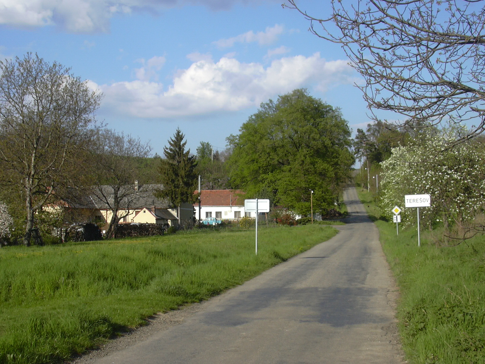 Terešov, příjezd ze směru Hlubočany (Vyškov District - Czech Republic)